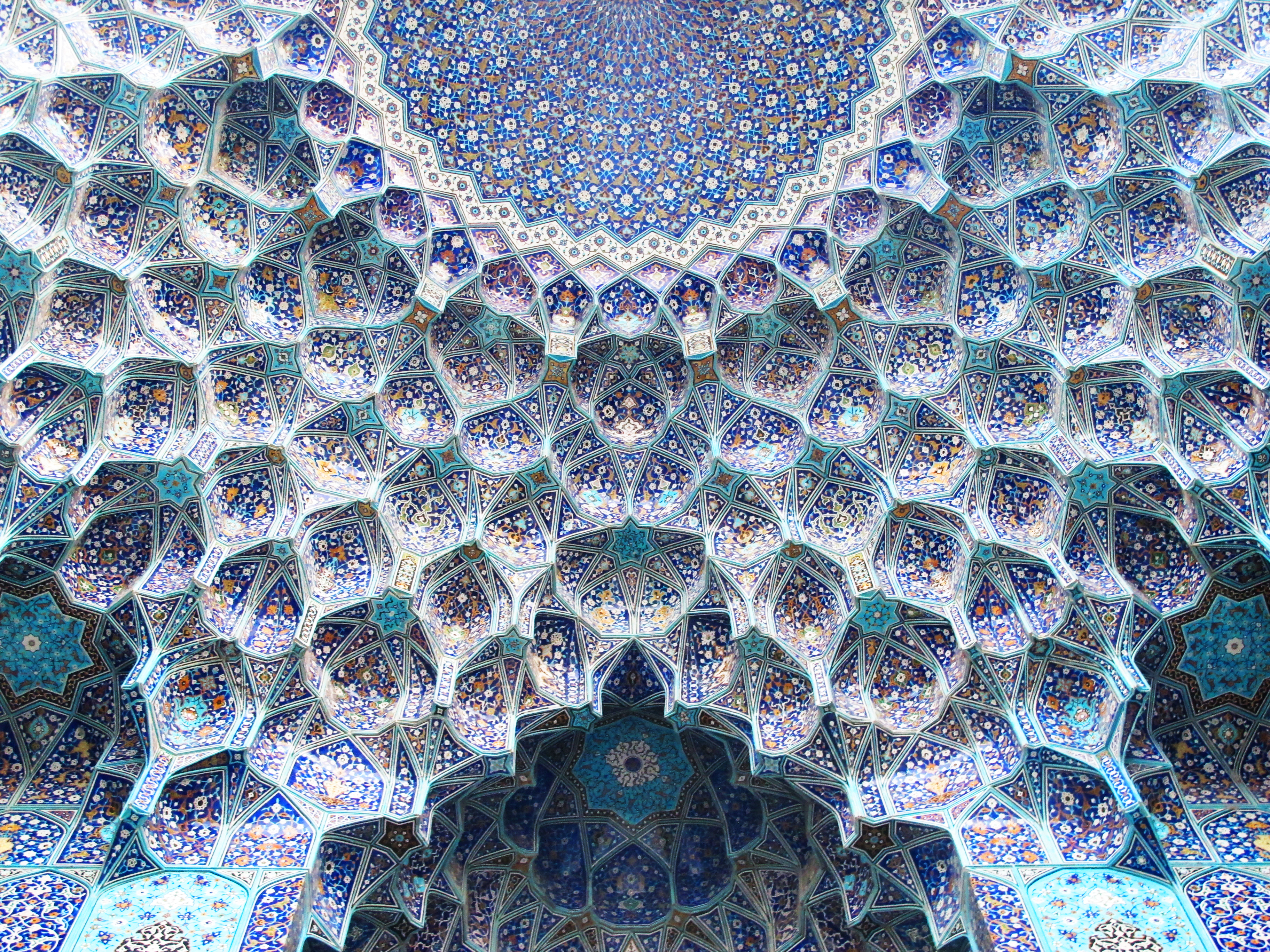 Iwan de la Mezquita del Imam Jomeini, ubicada en la Plaza de Naghsh-i Jahan